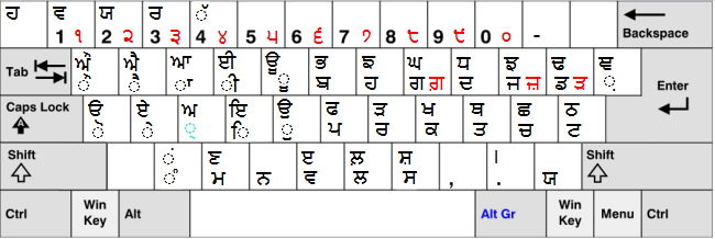 Windowsのパンジャブ語キーボード